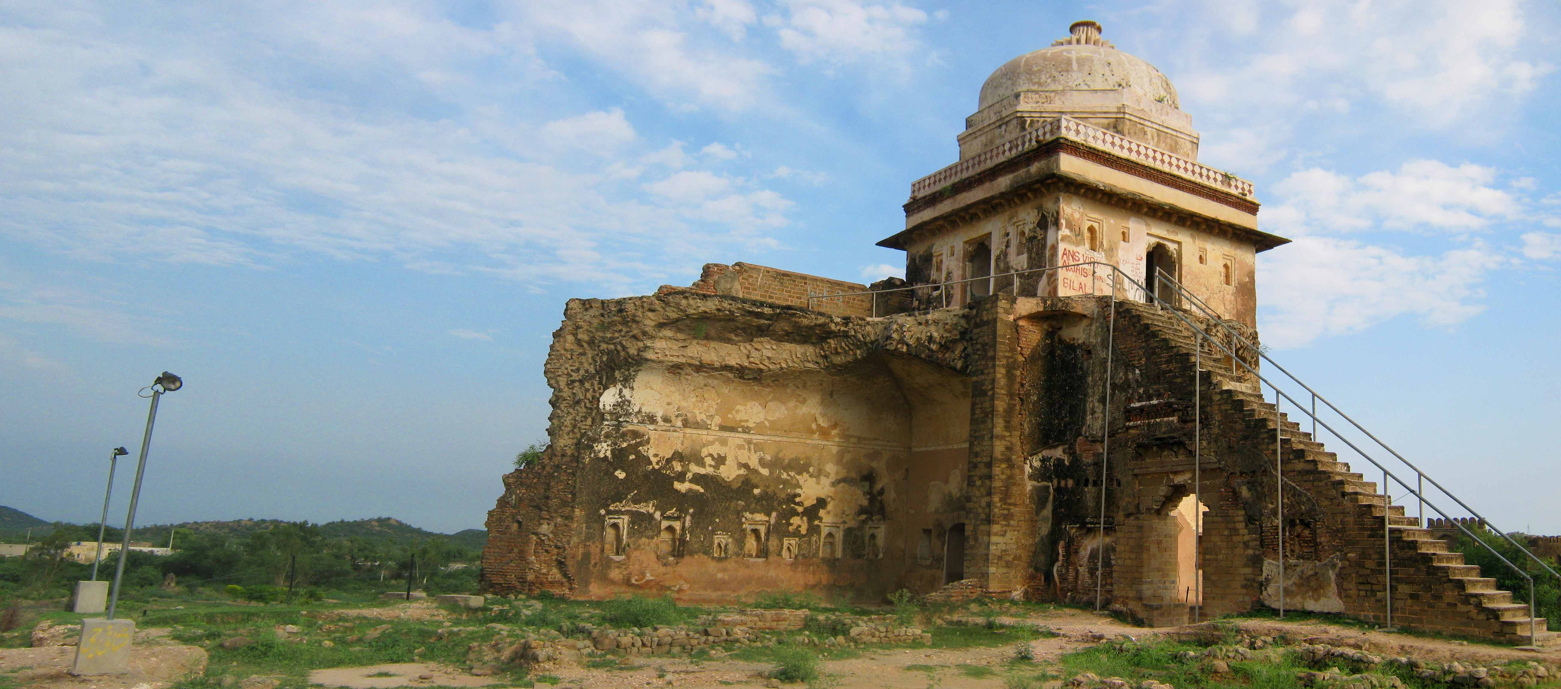 haveli man singh Rohtas Fort Pakistan